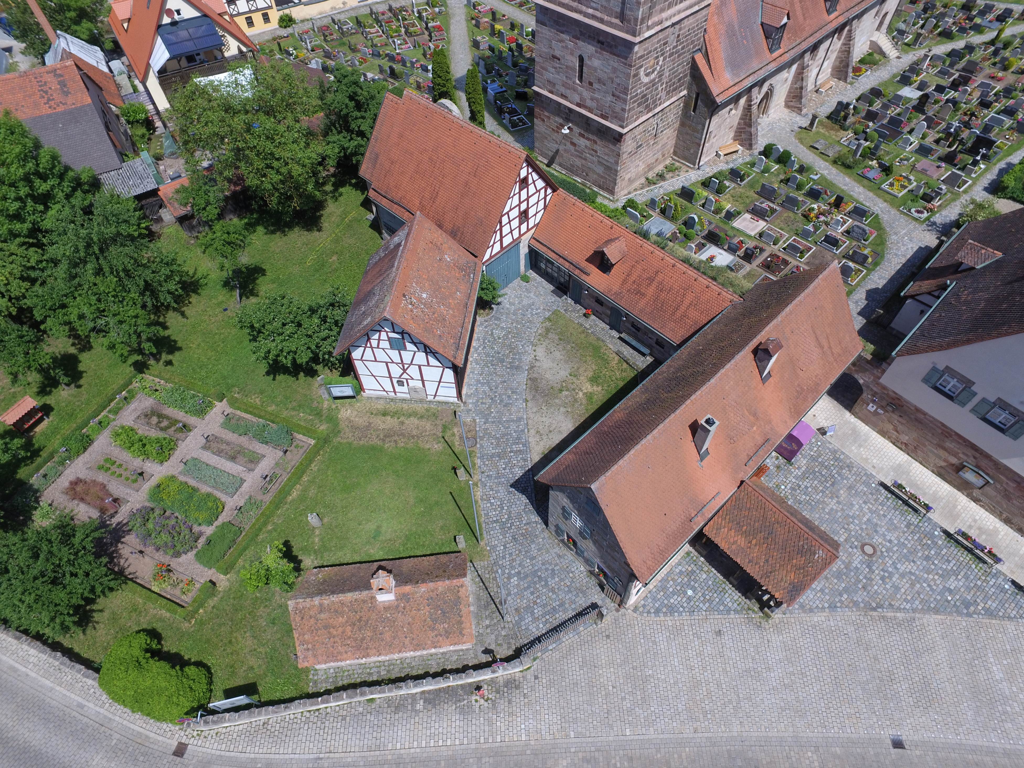 Museumshof Roßtal von oben betrachtet. Im Hintergrund die Laurentius Kirche mit Friedhof.